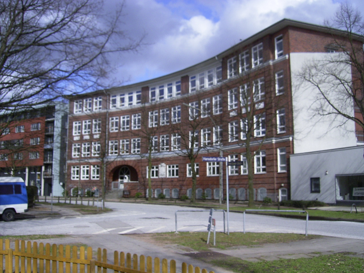 Ehemalige Volksschule Von-Essen-Straße (heute:HANSA-KOLLEG) in Barmbek-Süd. Erbaut 1909 bis 1911 von Albert Erbe.